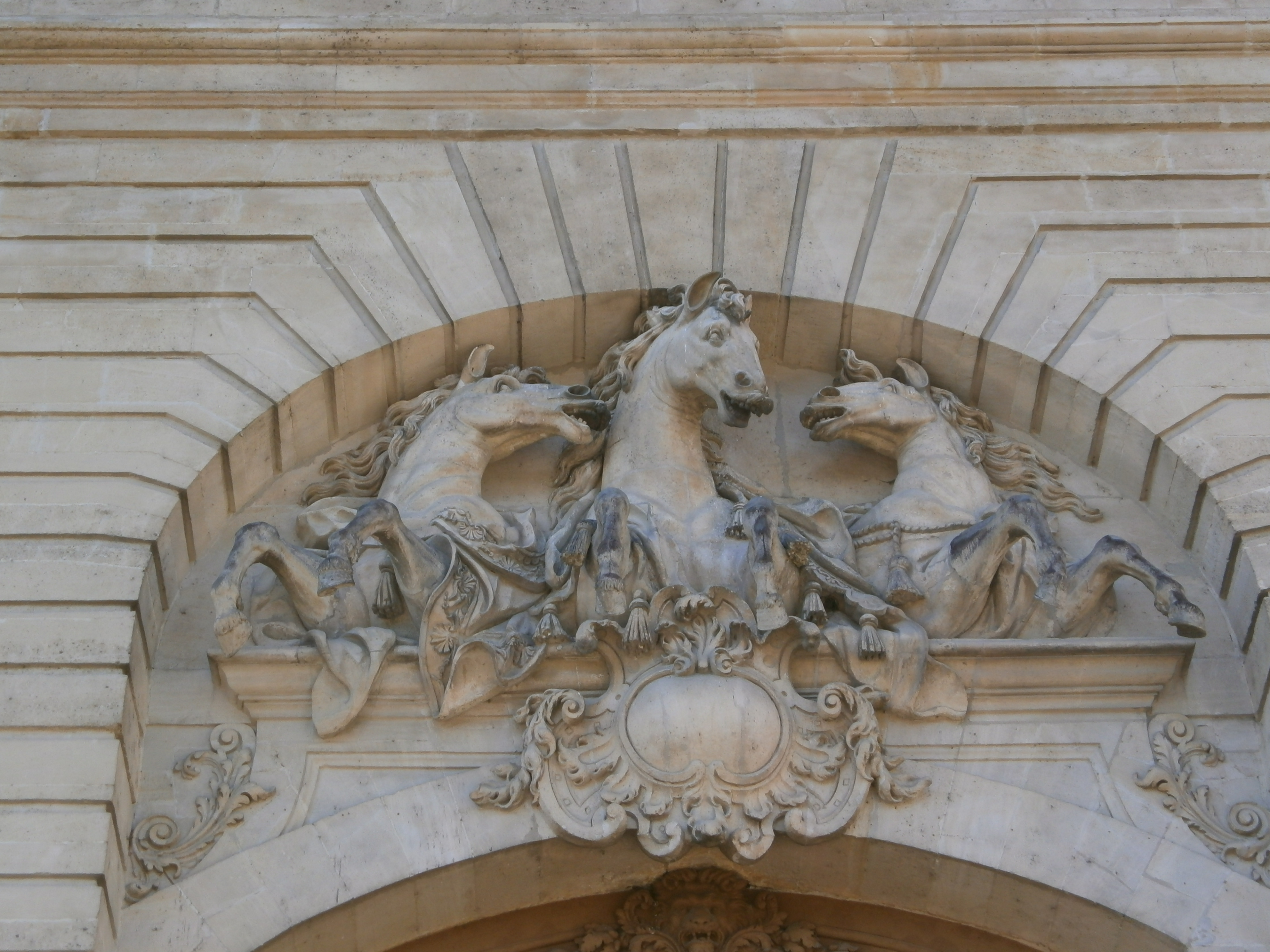 Vue avant des Grandes écuries de Chantilly (détail)